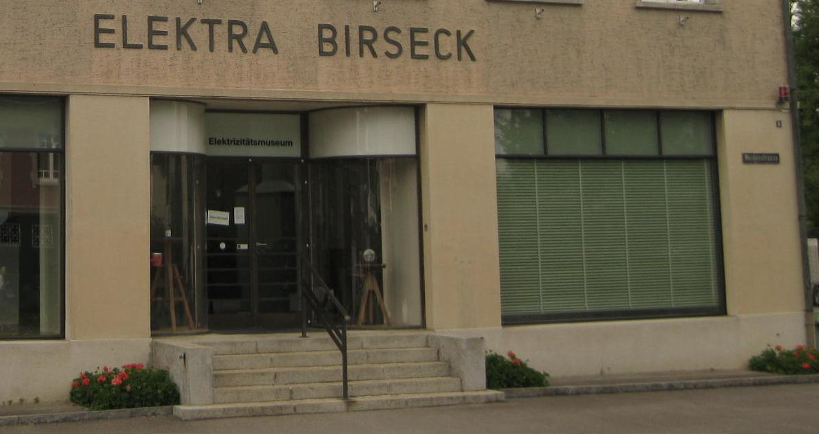 elektrizitätsmuseum eingang Münchenstein